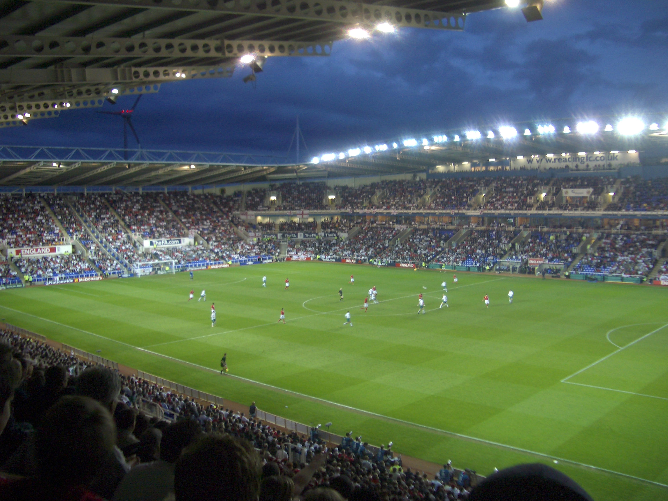 England B vs Belarus, Madejski Stadium, Reading